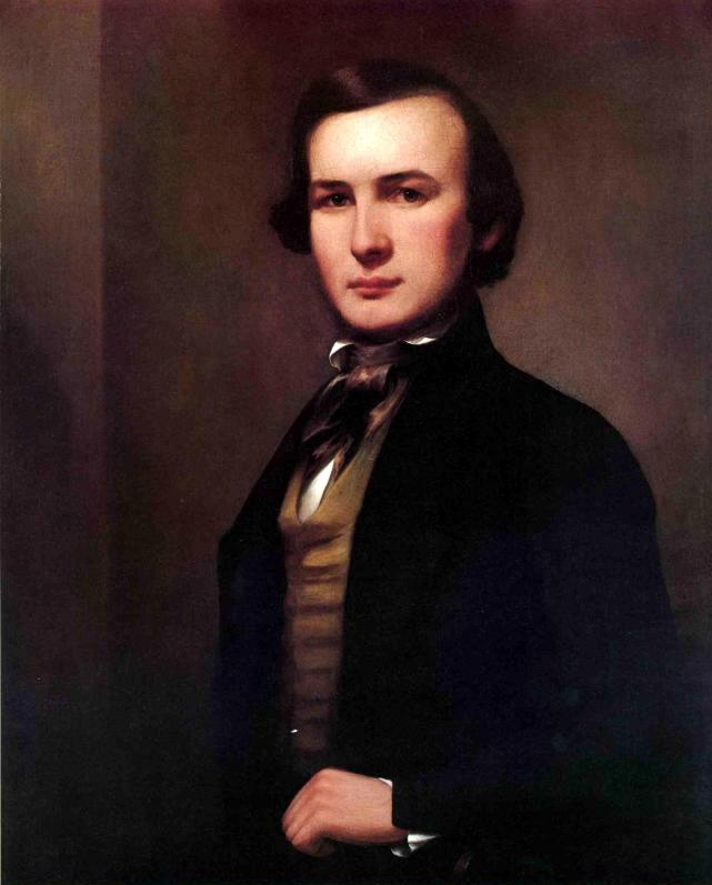 Self-portrait